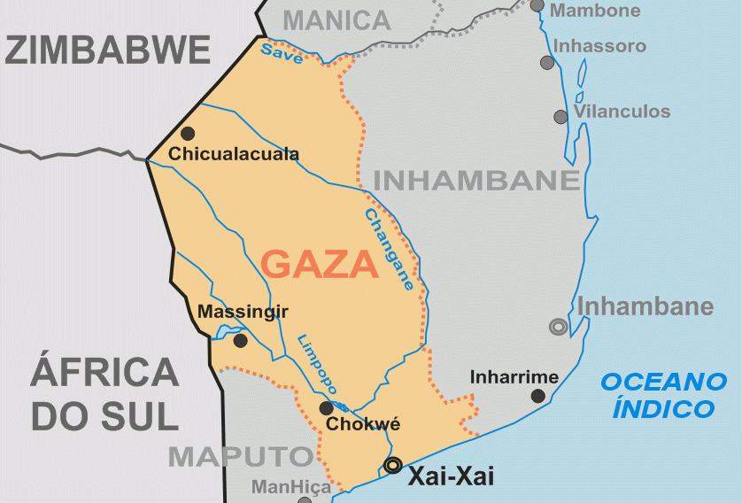 Mapa da Província de Gaza, em Moçambique - feita para a Wikipédia por André Koehne